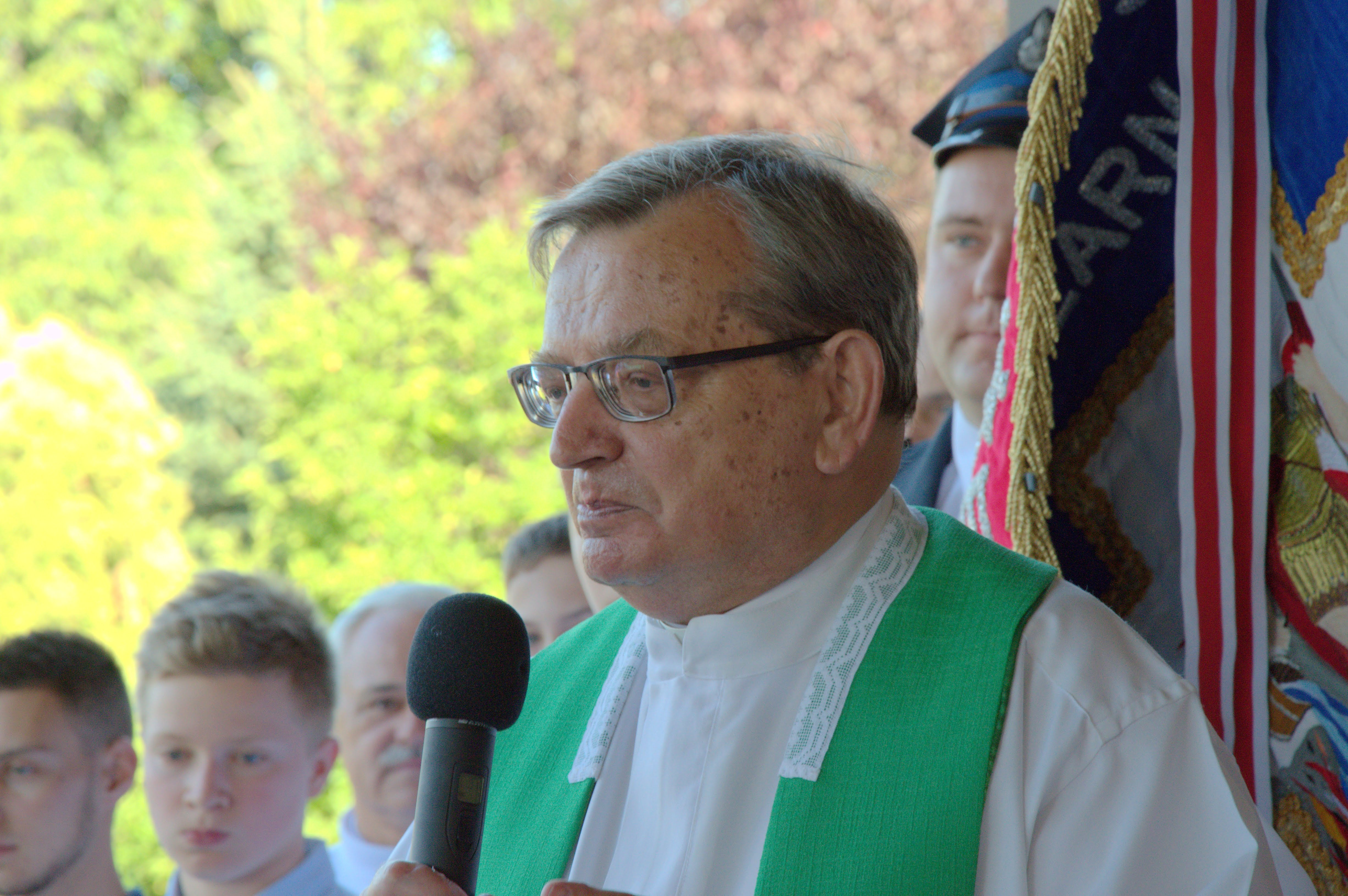 Pierwszy proboszcz parafii w Opolu-Chmielowicach ks.Alfred Michalik. Sierpień 2018 r.